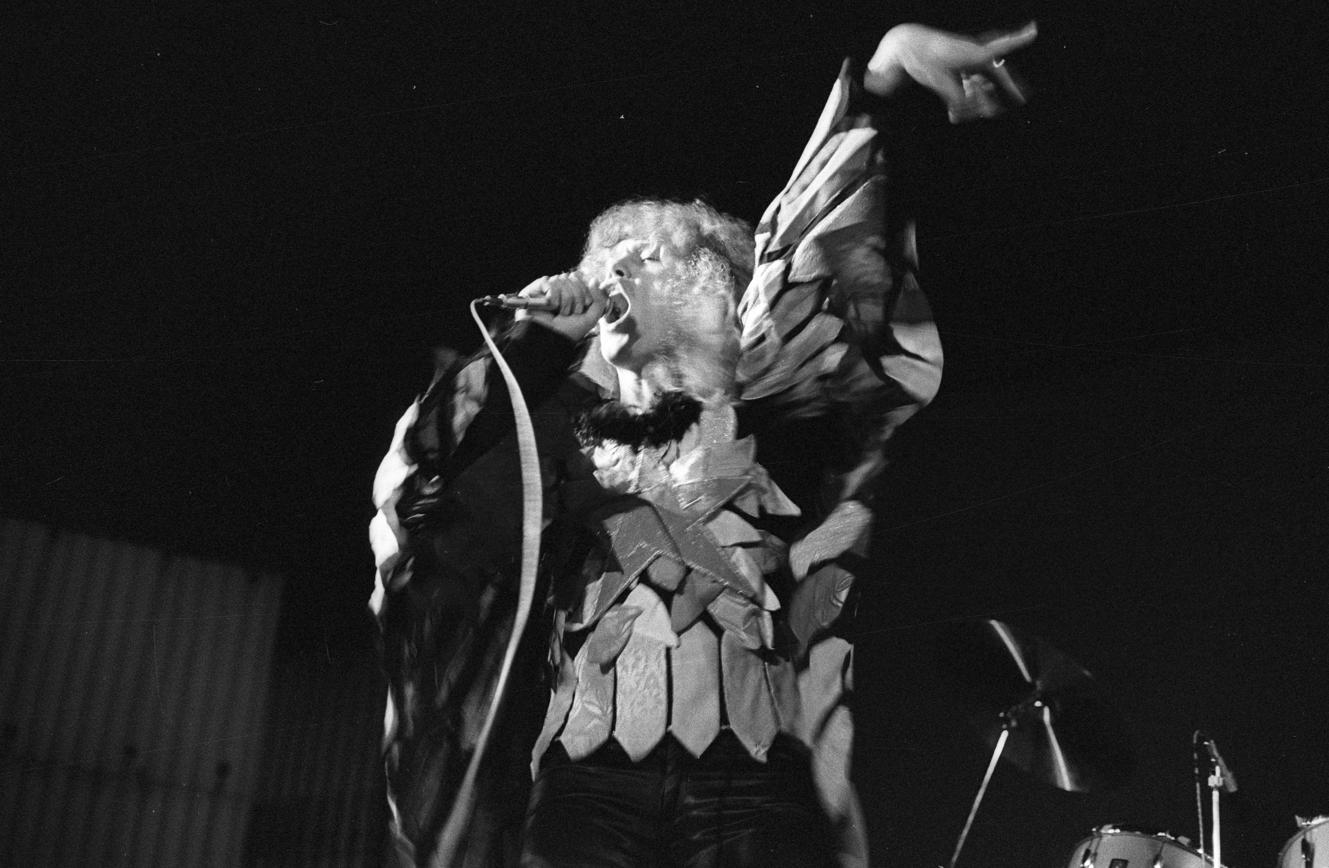 Omega együttes, Kóbor János. Location: Hungary Tags: pop music Title: Omega együttes, Kóbor János.